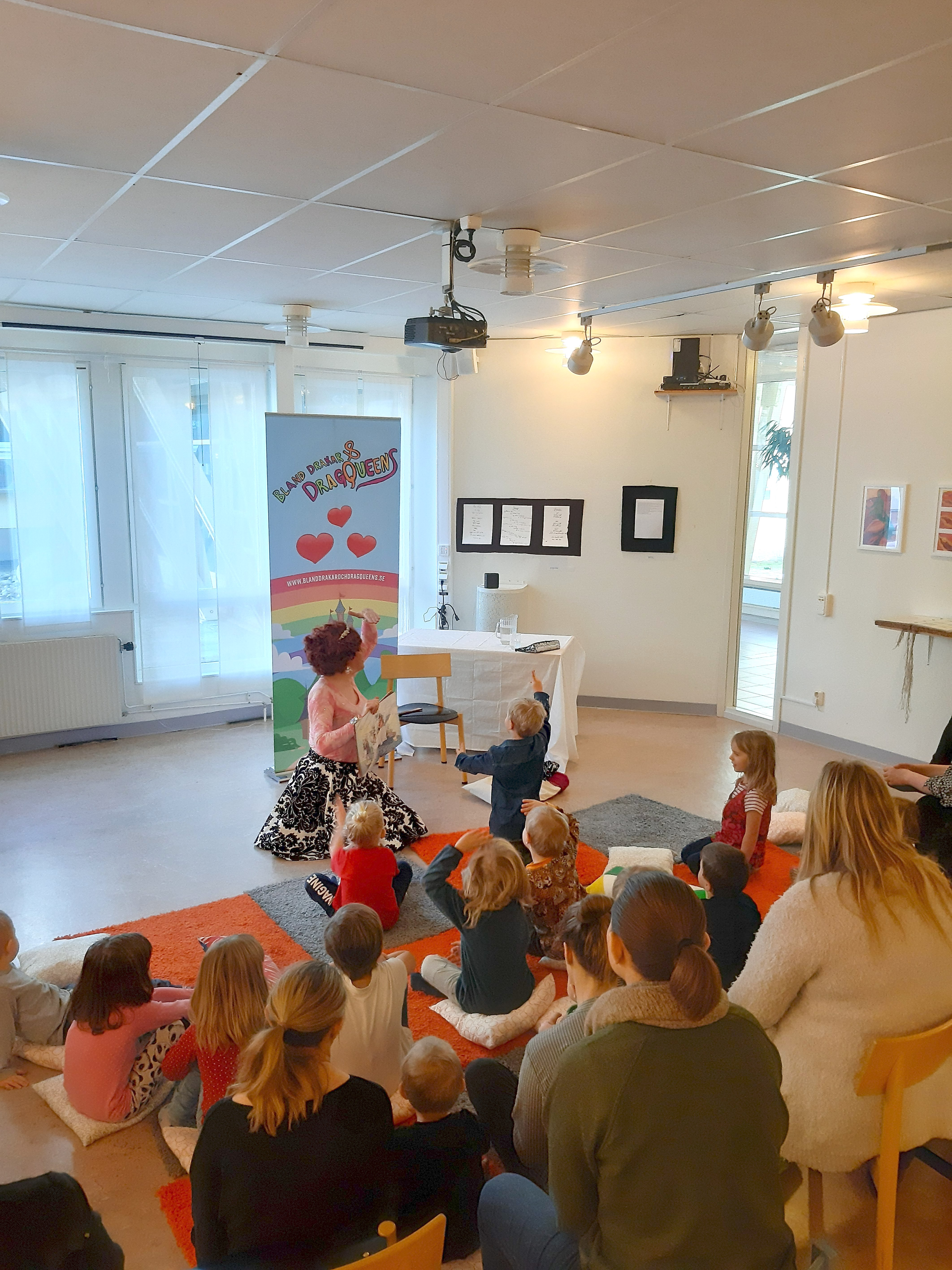 "Bland drakar och dragqueens" på Nordmalings bibliotek. Dragartisten Inga Tvivel läser saga för barn och vuxna.